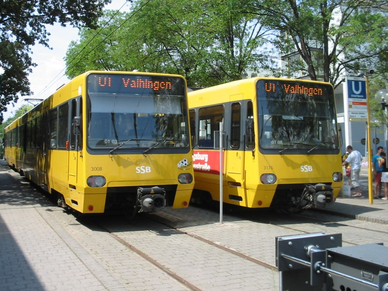 zwei SSB-Stadtbahnzüge an der U1-Endhaltestelle Fellbach Lutherkirche eigenes Foto / alle Rechte freigegeben